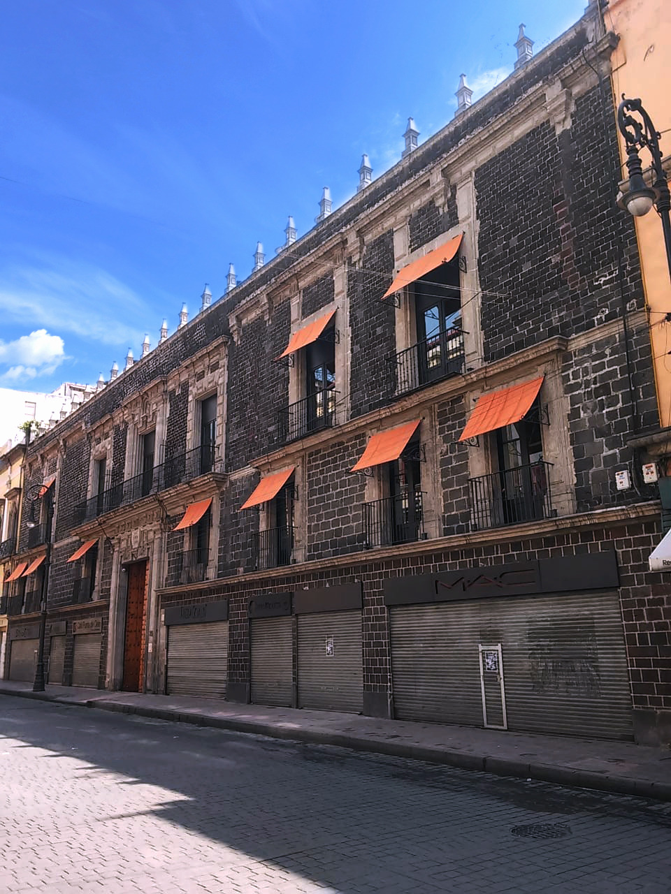 Casa de los condes de Miravalle en Isabel la Católica 30, centro histórico de la ciudad de México